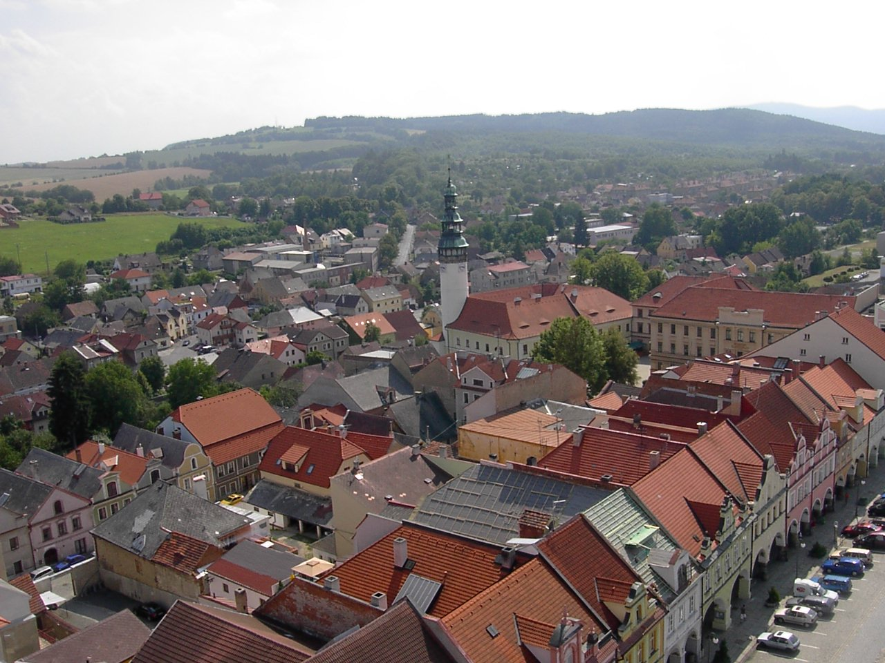 Česky: Chodský hrad z věže na náměstí v Domažlicích.